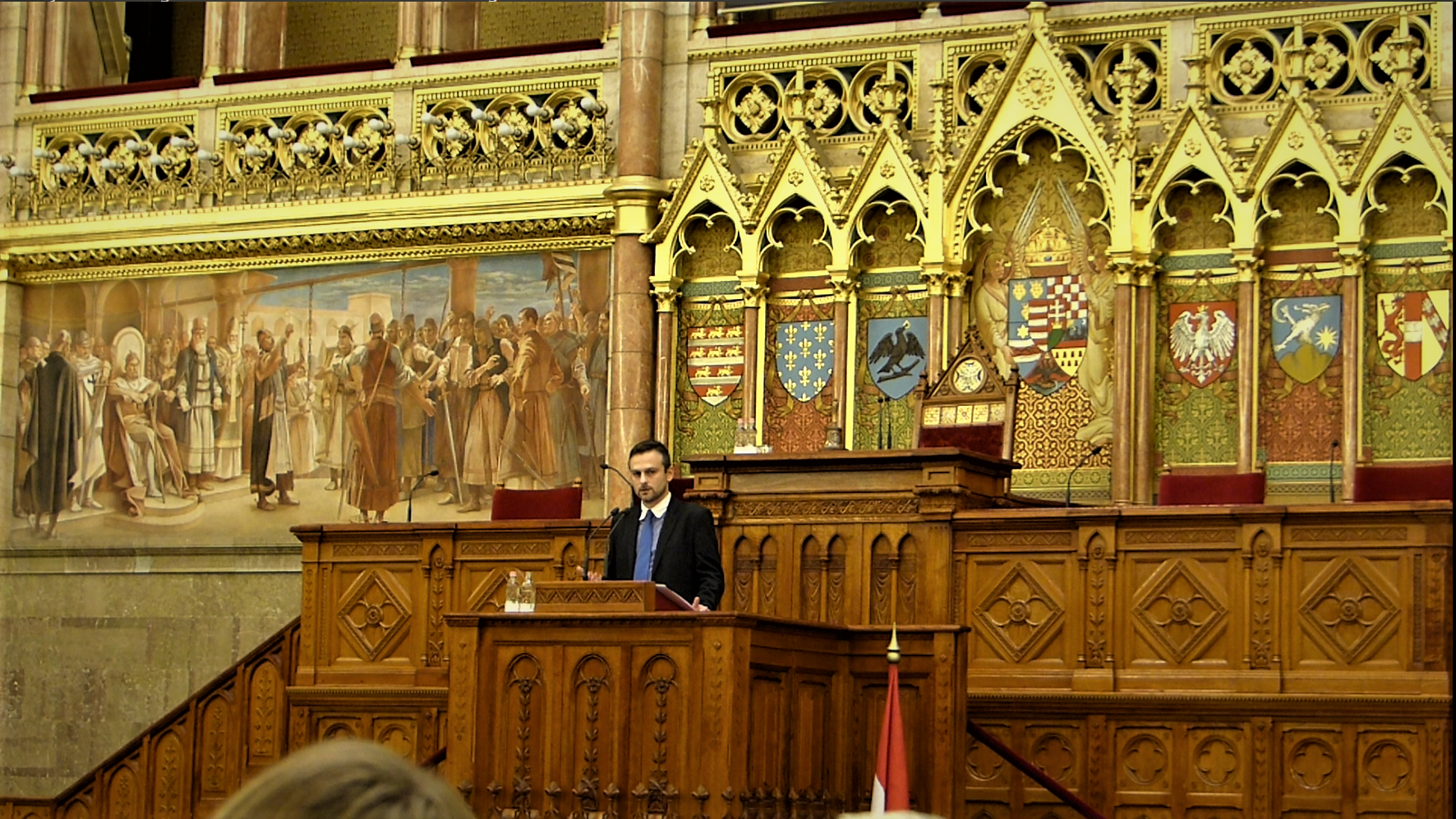 Mitrovits Miklós (Magyar Tudományos Akadémia Bölcsészettudományi Kutatóközpont Történettudományi Intézet) Eltérő utak a sztálinizmushoz Kelet-Közép-Európában. Okok és következmények címmel tartott előadást a Felsőházban a Sztálin árnyékában - A szovjet modell exportja Kelet-Közép-Európában című konferencián. A felvétel 2017. november 24-én, pénteken készült.